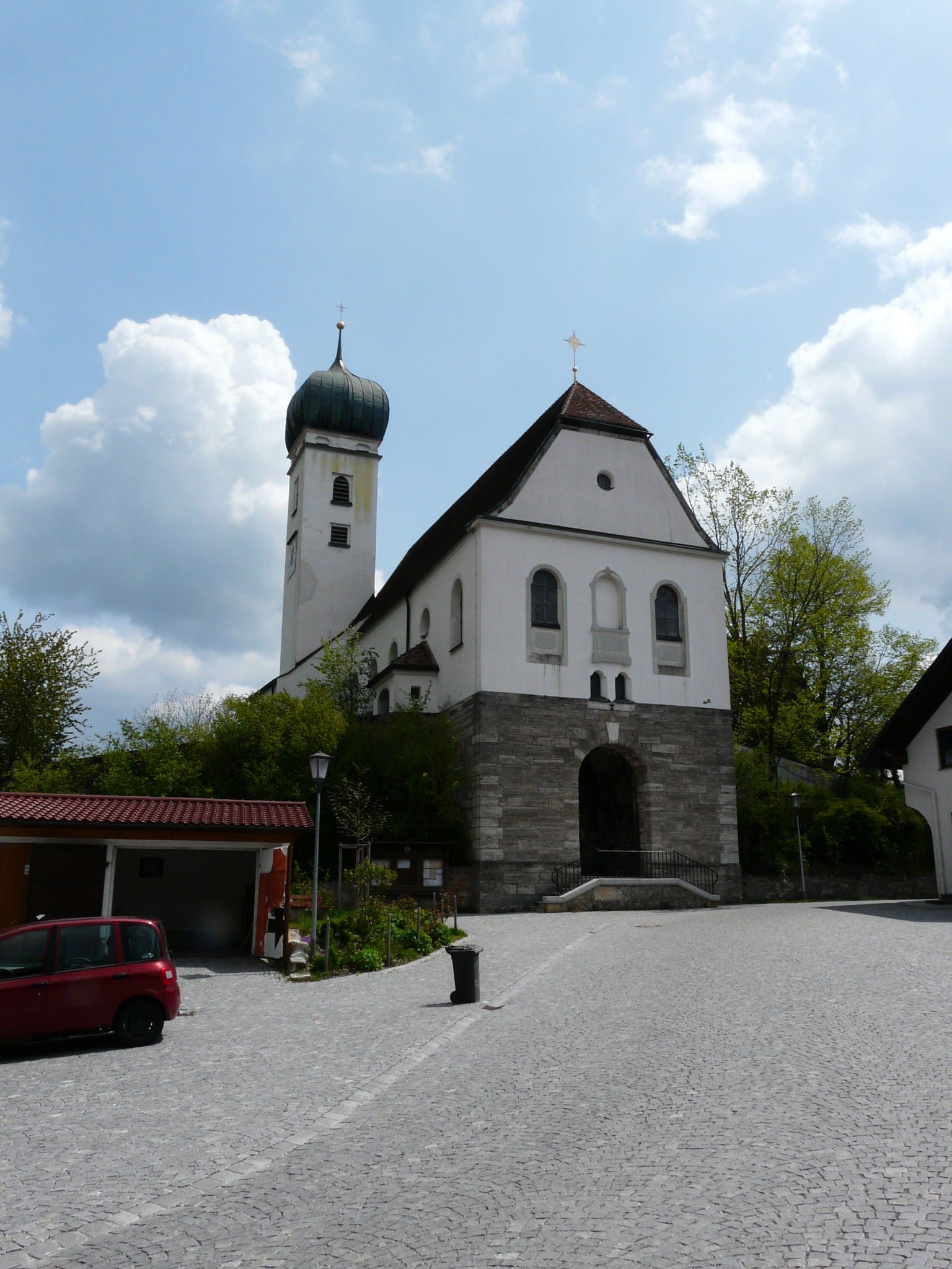 Kirche in Böbing